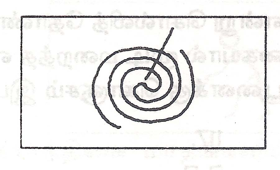 திரிகுத்து விளையாட்டில் திரியைச் சுற்றிக் குத்துதல் - படம் 'மறைகின்ற விளையாட்டுகள் என்னும் எனது நூலிலிருந்து எடுக்கப்பட்டது.